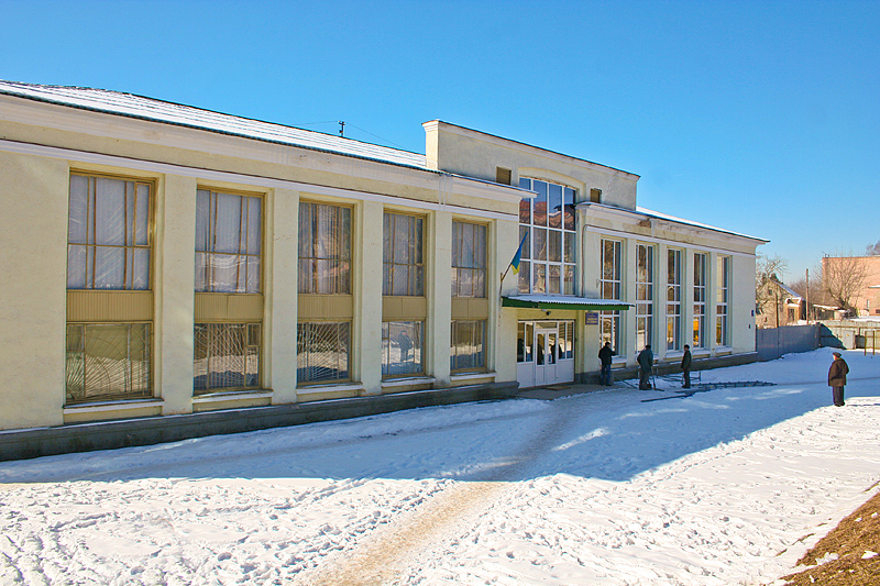 filharmonia in Lutsk